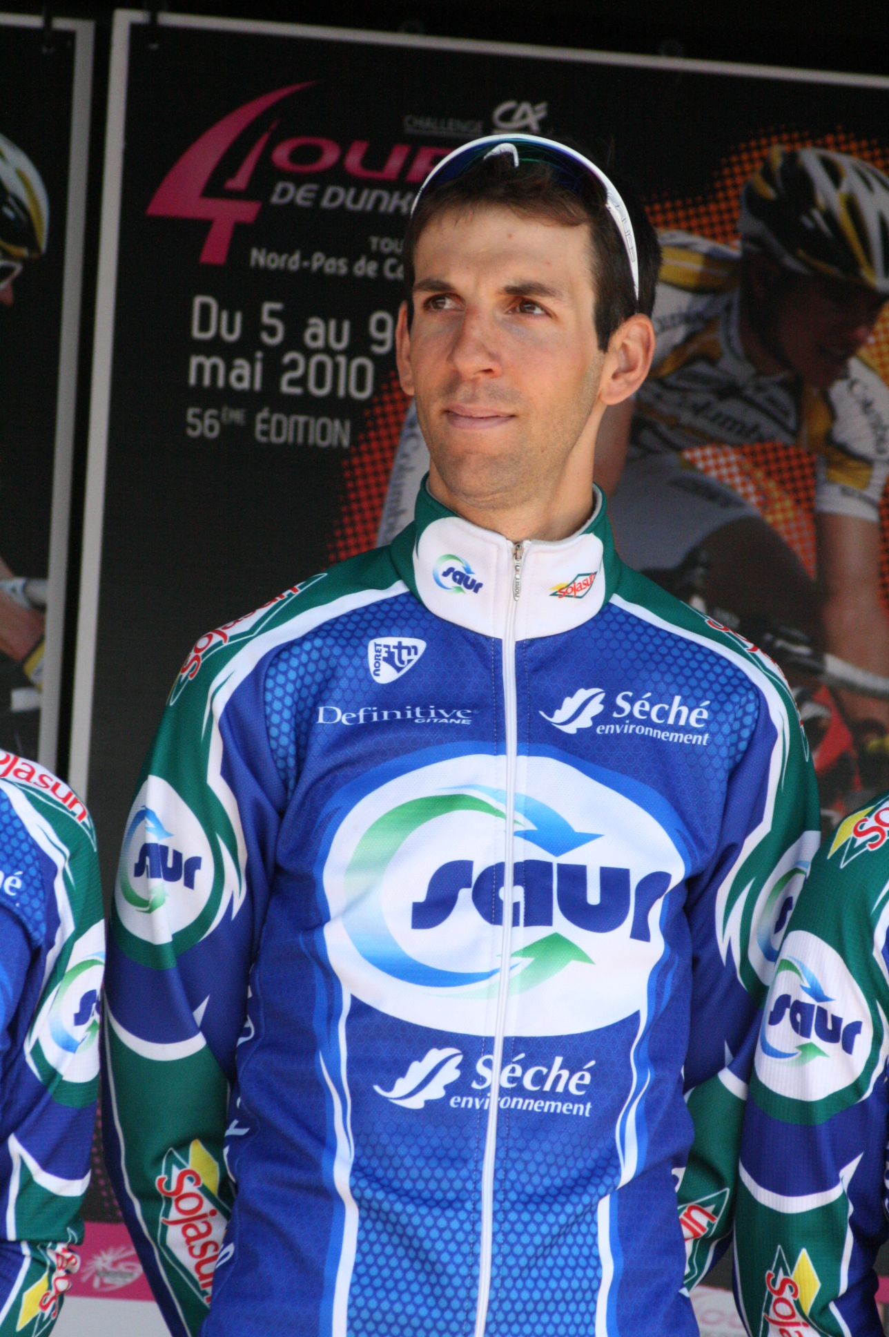 Laurent Mangel lors de la présentation des équipes des 4 jours de Dunkerque 2010